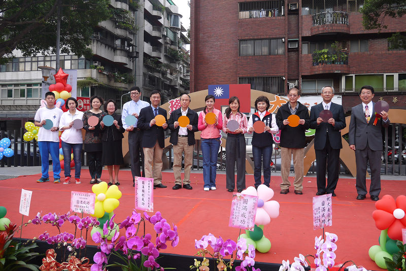 大安國中新圍牆揭幕-大安密碼